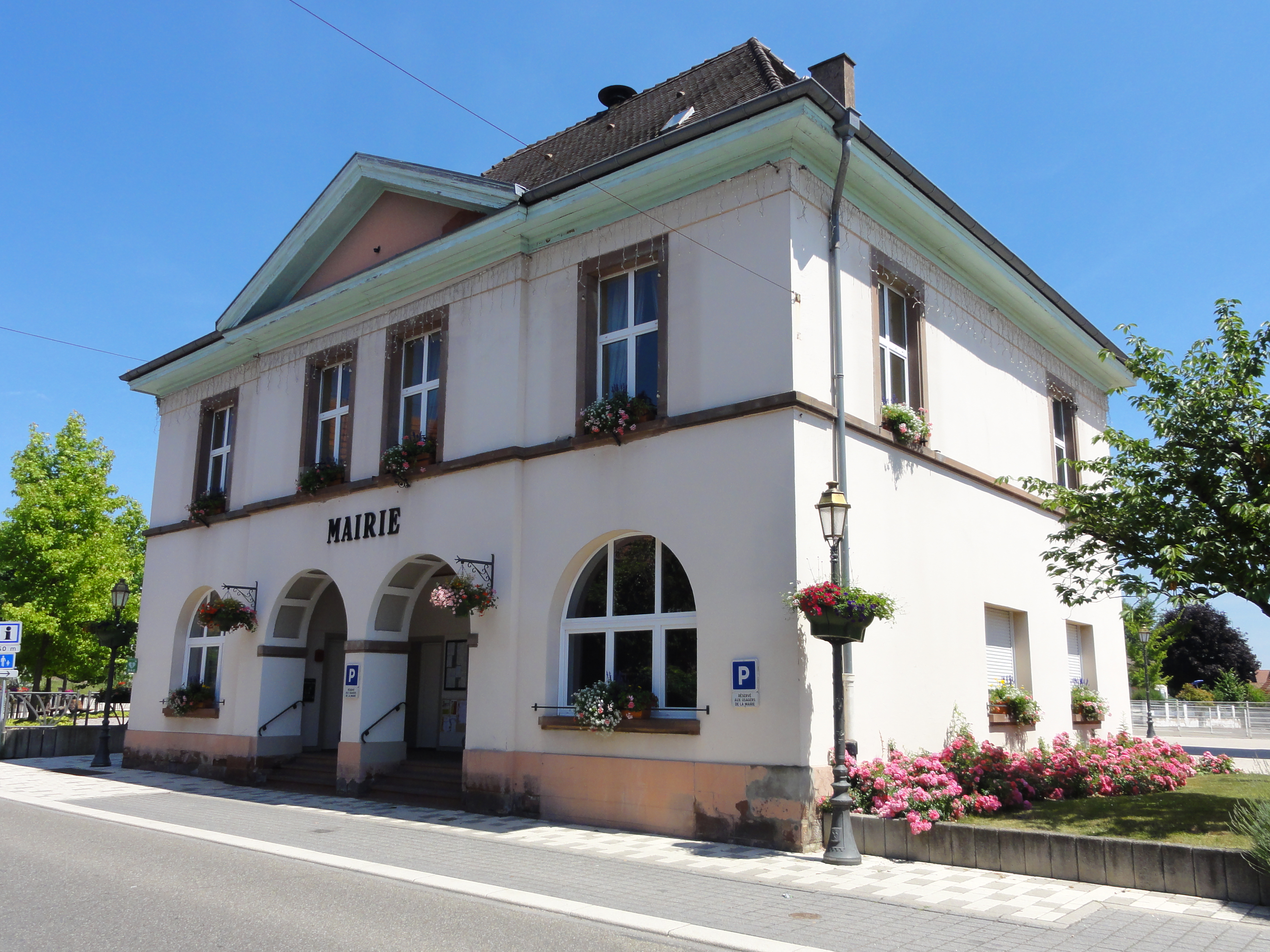 Alsace, Bas-Rhin, Gries, Mairie, 56 rue Principale.